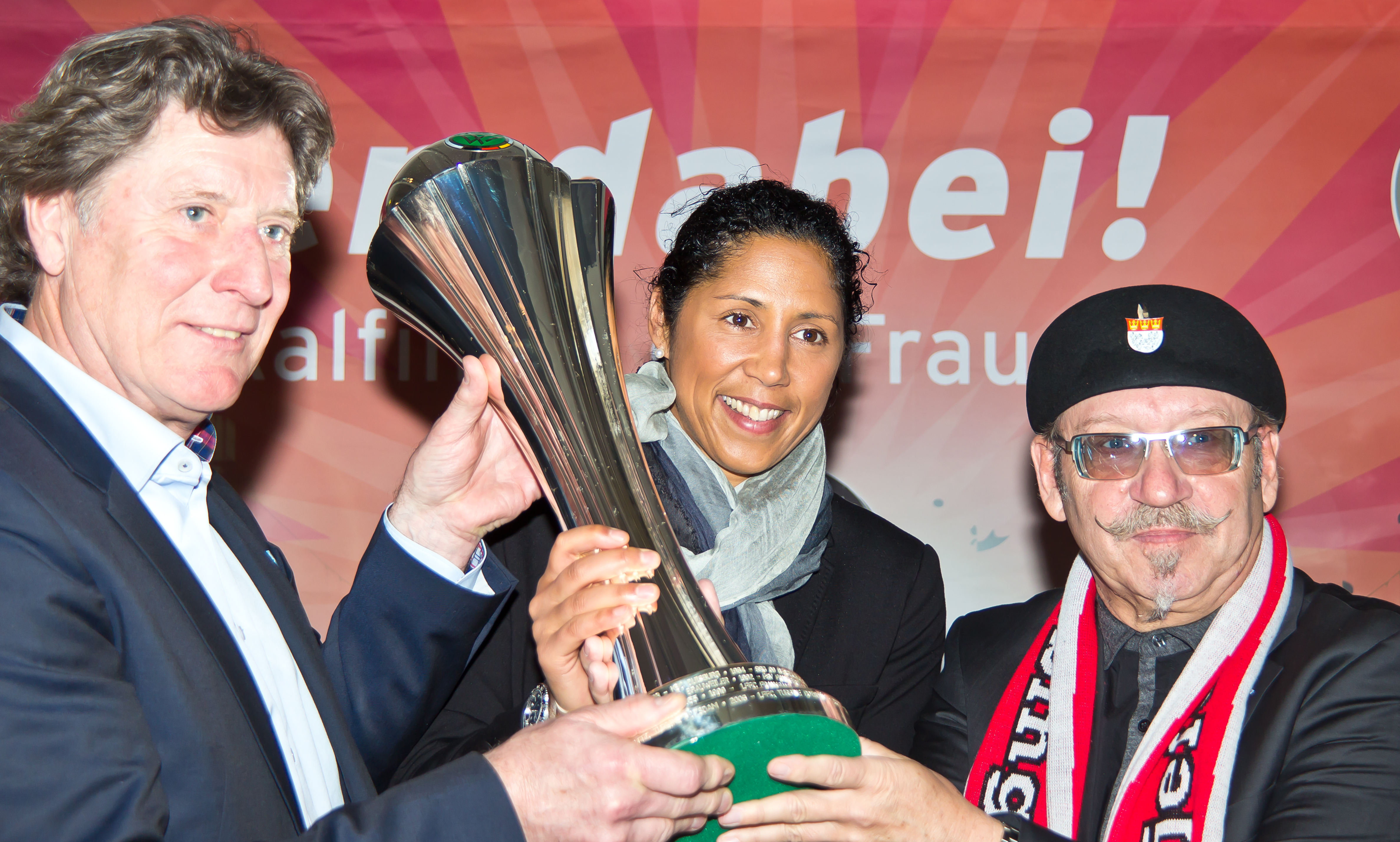 Pressetermin im Deutschen Sport & Olympia Museum Köln: Übergabe der Siegertrophäe für das DFB-Pokalfinale der Frauen (19. Mai 2013 im RheinEnergieStadion) durch DFB-Direktorin Steffi Jones an den Austragungsort Köln. Den Pokal nehmen FC-Vizepräsident Toni Schumacher und Höhner-Schlagzeuger Janus Fröhlich als Botschafter der Stadt Köln für das DFB-Pokalfinale der Frauen sowie Horst Meyer, stellvertretender Leiter des Sportamtes, entgegen. Den Pokal präsentieren: Toni Schumacher, FC-Vizepräsident und Botschafter der Stadt Köln für das DFB-Pokalfinale der Frauen Steffi Jones, DFB-Direktorin Janus Fröhlich, Schlagzeuger der Höhner und Botschafter der Stadt Köln für das DFB-Pokalfinale der Frauen